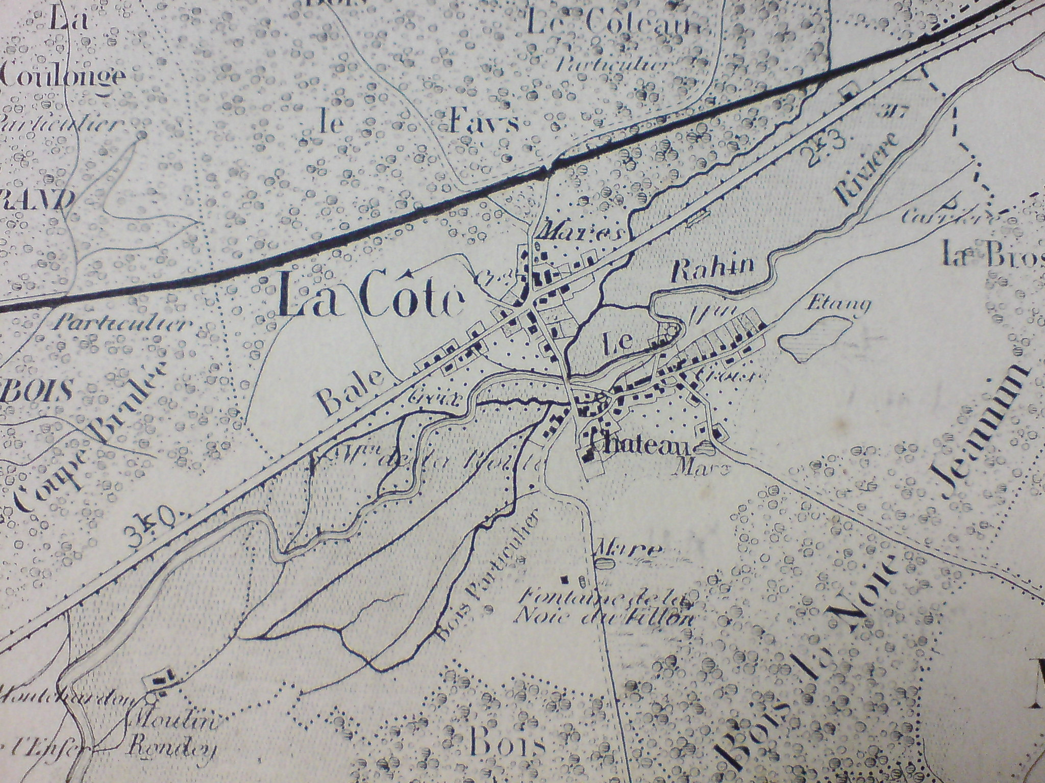 Photo de La Côte sur une carte de l'Atlas Cantonal en 1858